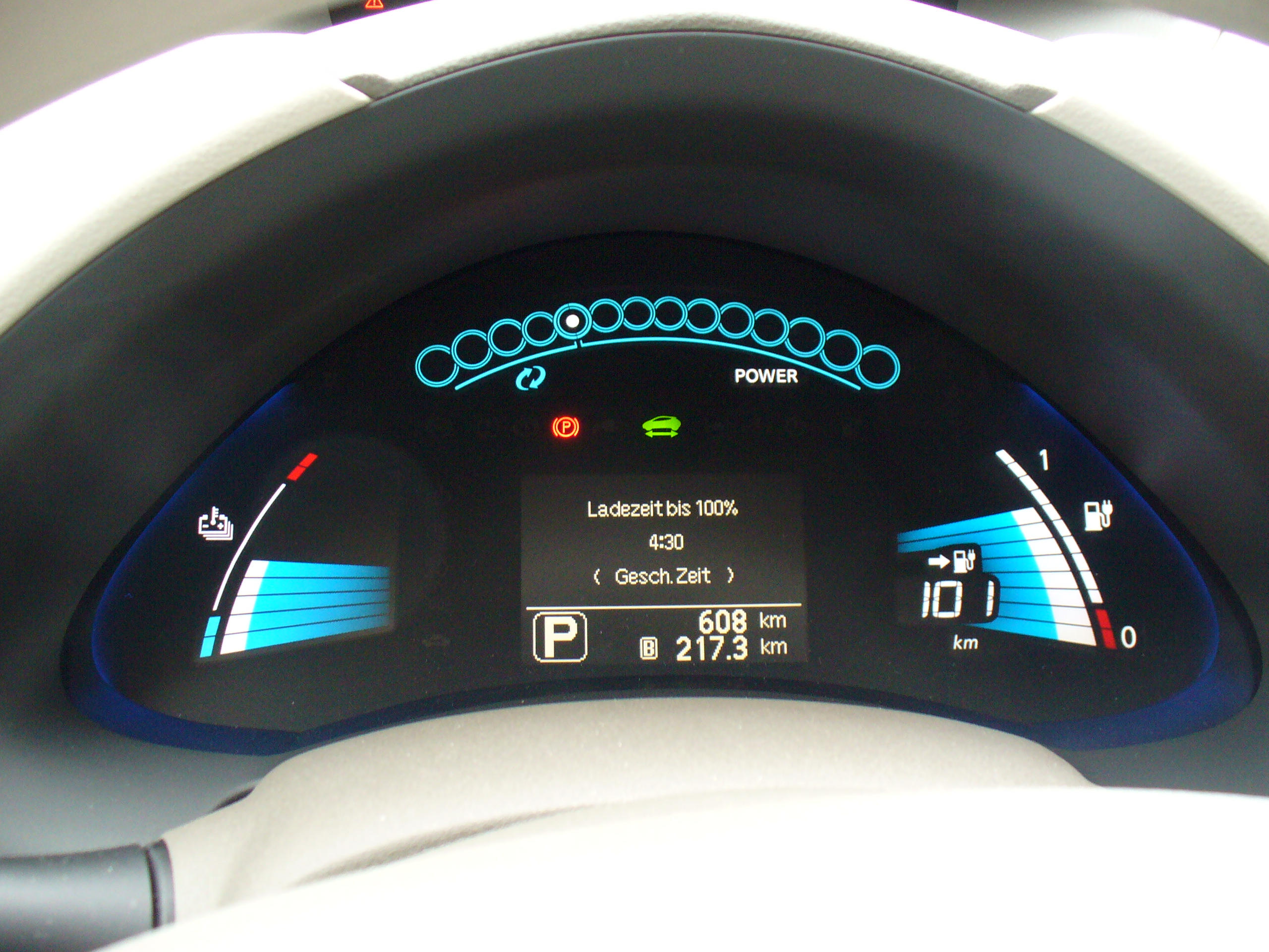 Nissan Leaf Kombianzeigeinstrument